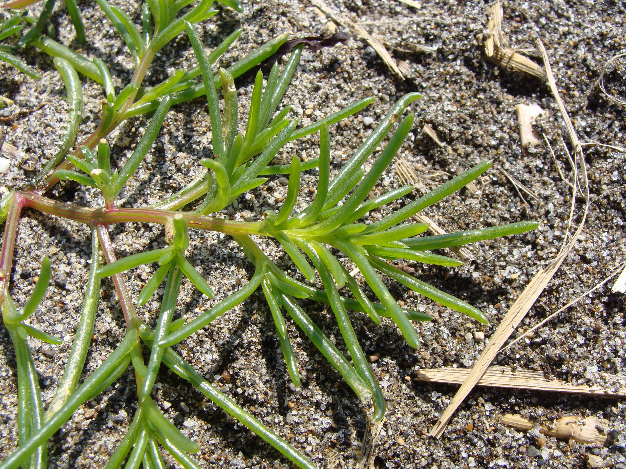 Kali komarovii (Iljin) Akhani & E. H. Roalson, (Syn.: Salsola komarovii Iljin)（オカヒジキ）